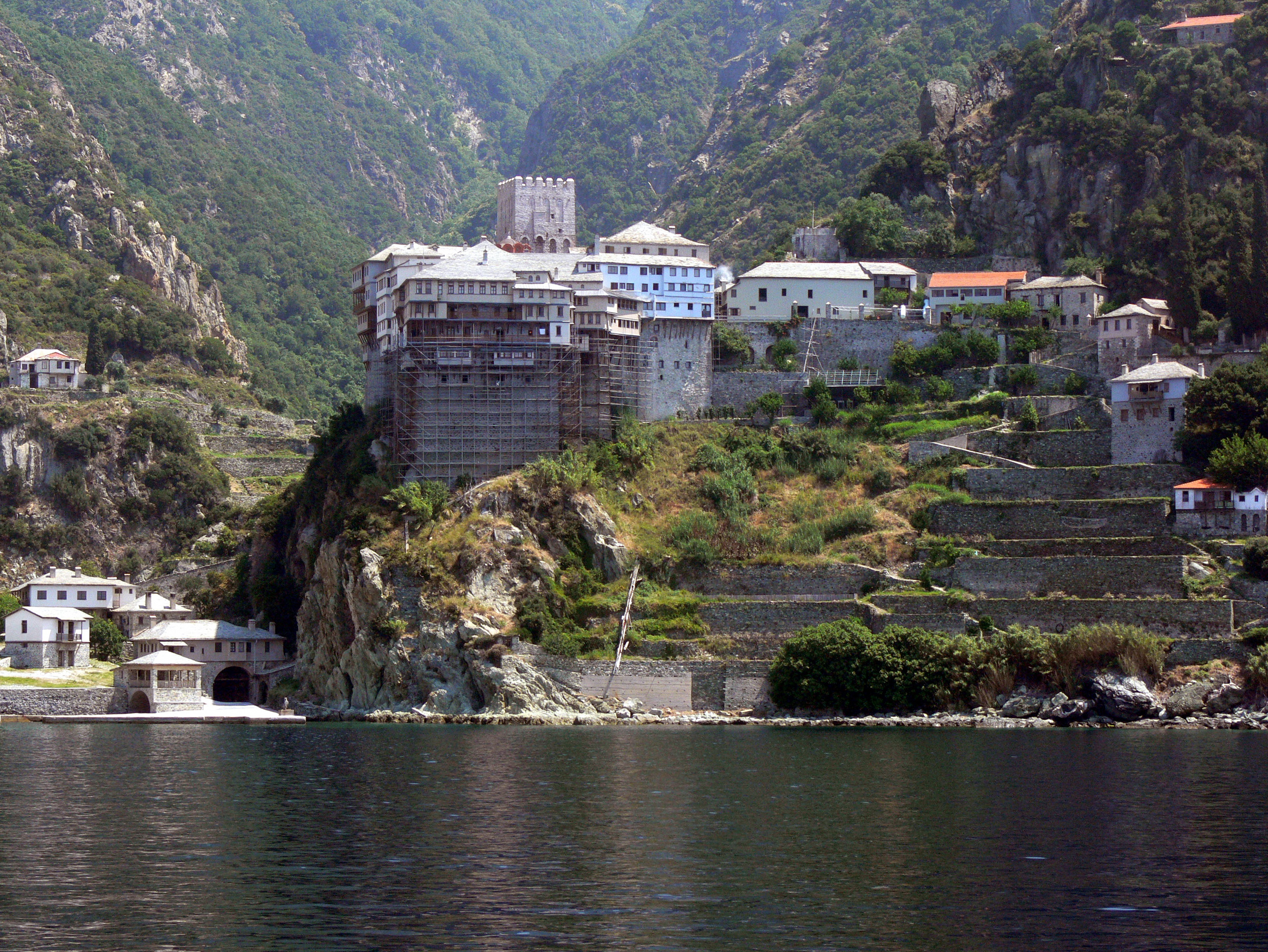 Kloster Dionisiou